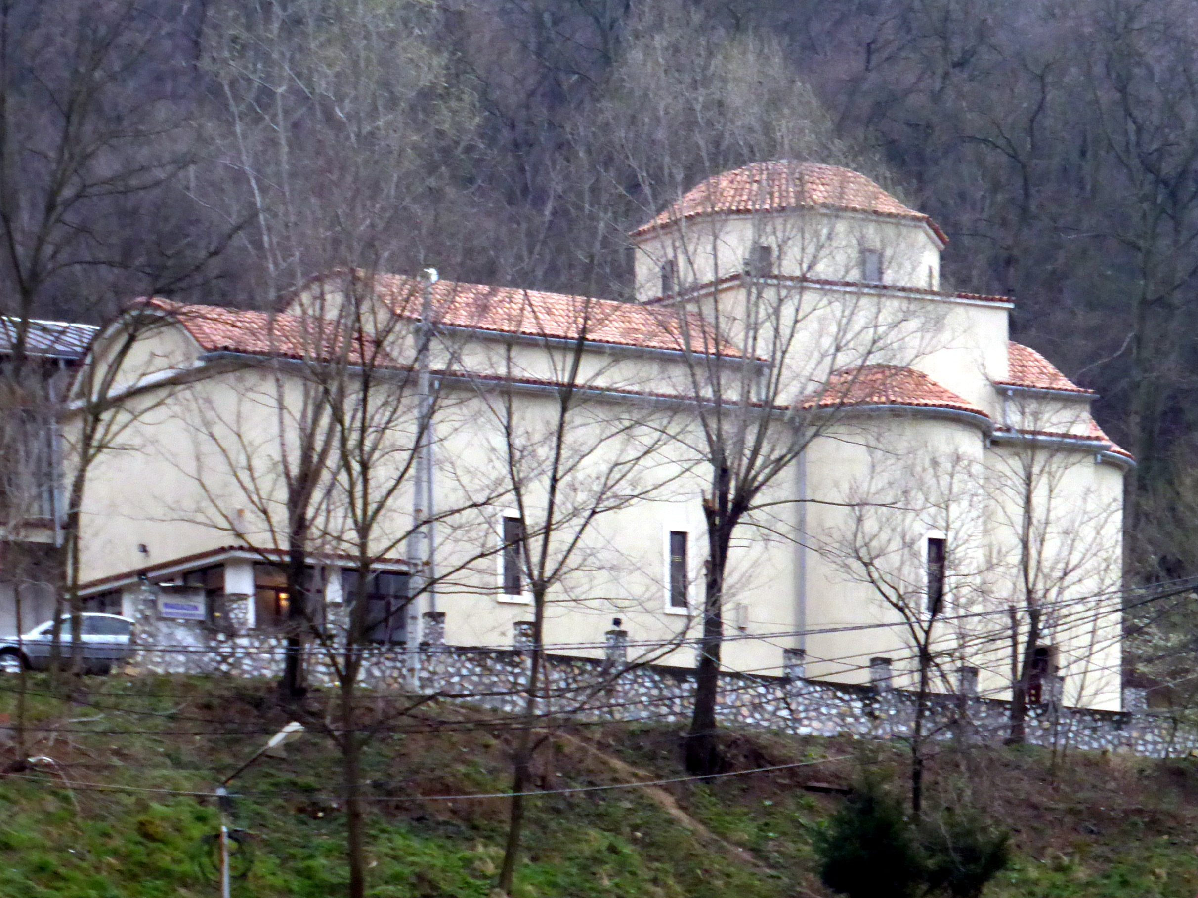 Das Kloster Piatra Scrisă (Kreis Karasch-Severin, Rumänien).